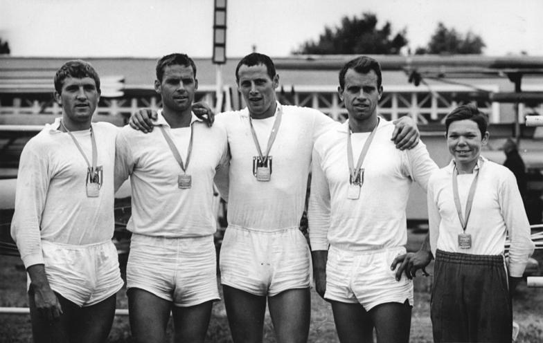 Ruderer, DDR, Vierer Zentralbild Wendorf-28.7.69 Brandenburg: 1. Verbandstreffen des Deutschen Rudersportverbandes der DDR am 20.7.69- Im Vierer m. Stm. erkämpften sich Klaus Jakob, Manfred Gelpke, Roland Göhler, Dieter Schubert und Stm. Dieter Gaitzsch den Meistertitel